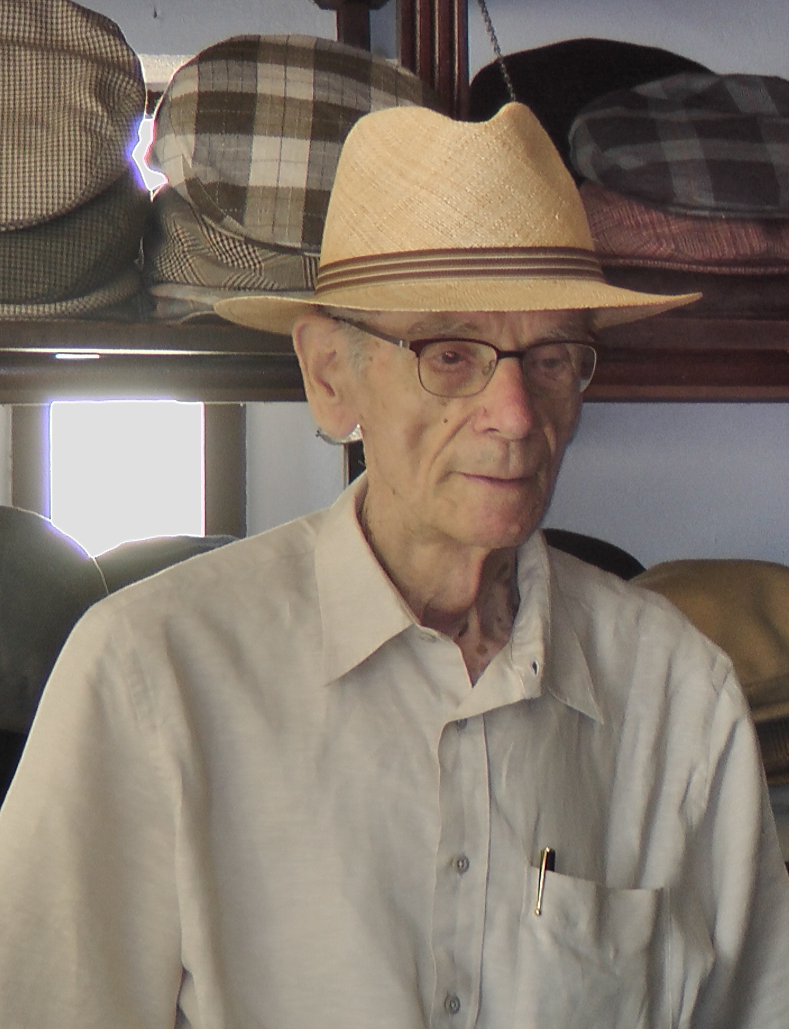 Dr. Ulrich Haas, Museumsleiter des Freilichtmuseums Roscheider Hof im Mai 2015 bei der Eröffnung des Hutladens für Herrenhüte